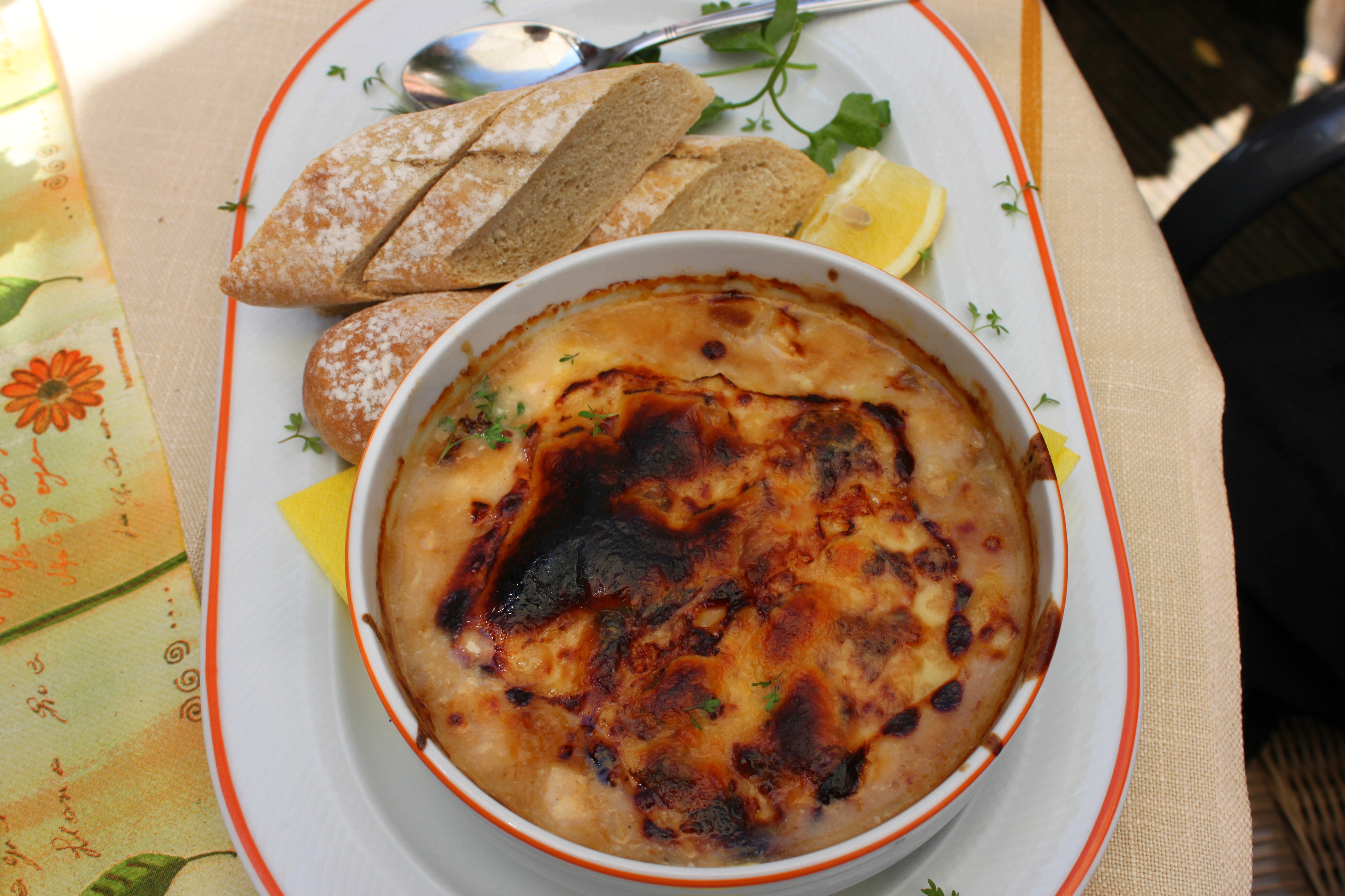 Würzfleisch ist ähnlich Ragout fin jedoch mit Geflügel- oder Schweinefleisch. Das Fleisch wird in Brühe gekocht und dann in kleine Stücke geschnitten. Aus der Brühe wird eine helle Soße hergestellt. Fleischstücke und Soße werden mit Käse überbacken und mit Worcestersoße, Zitrone und Toast serviert. Das Gericht stammt von den HO-Gaststätten der DDR und wird meist als Vorspeise aber auch als Hauptgang serviert. Fotografiert im Restaurant Zur Noll in Jena